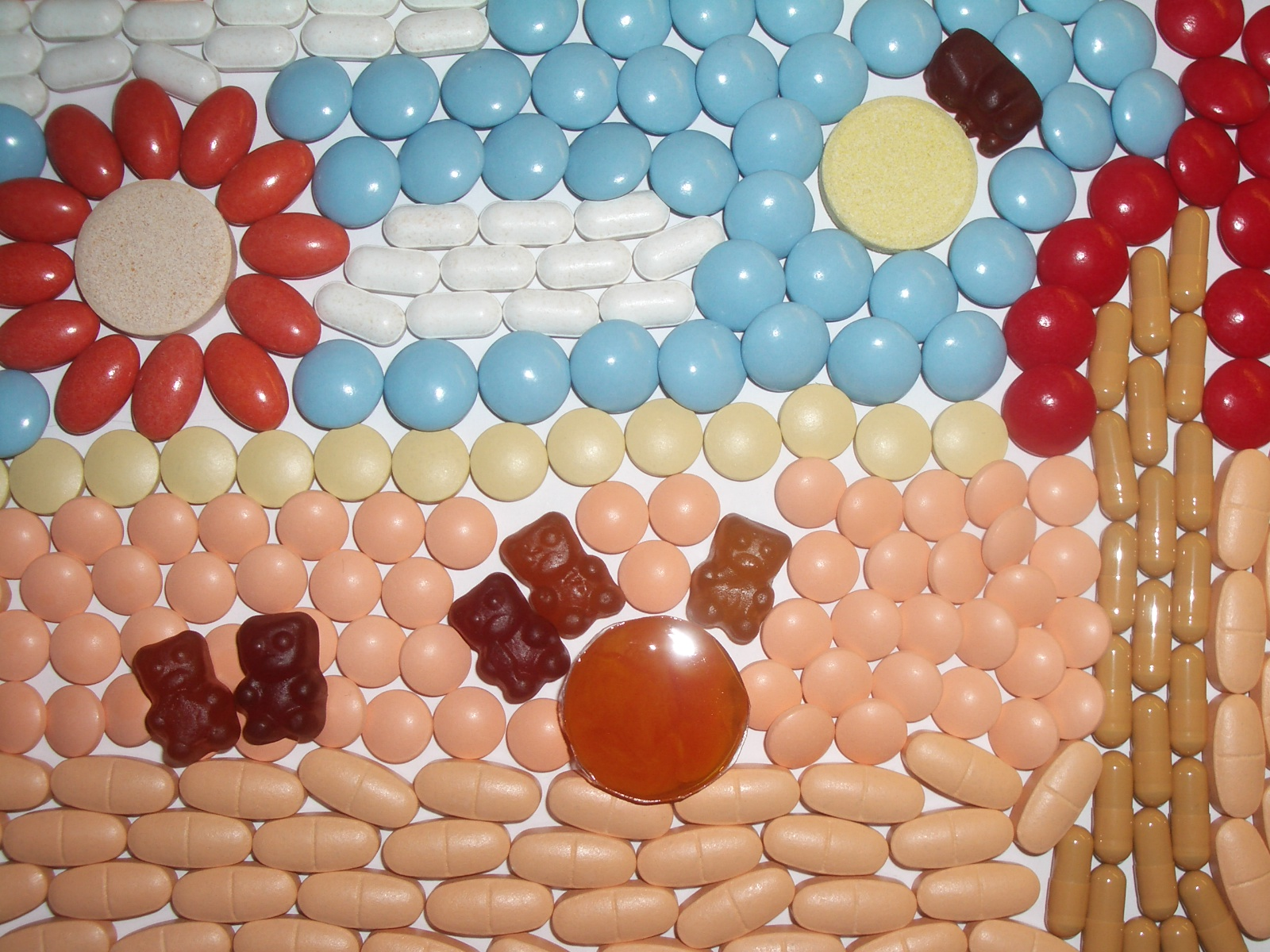 Картинка из поливитаминов